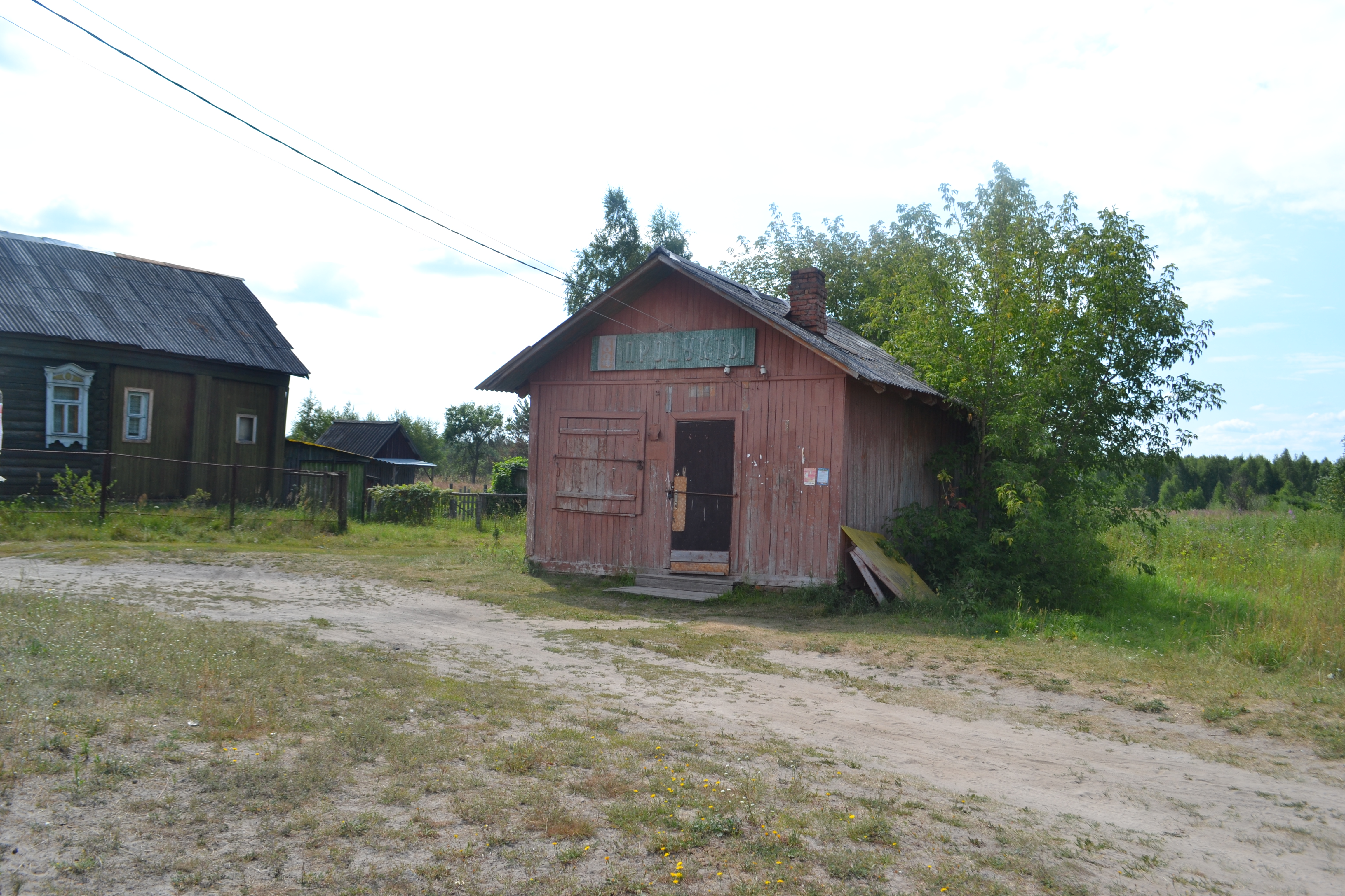 Бывший магазин в деревне Обухово (Шатурский район)